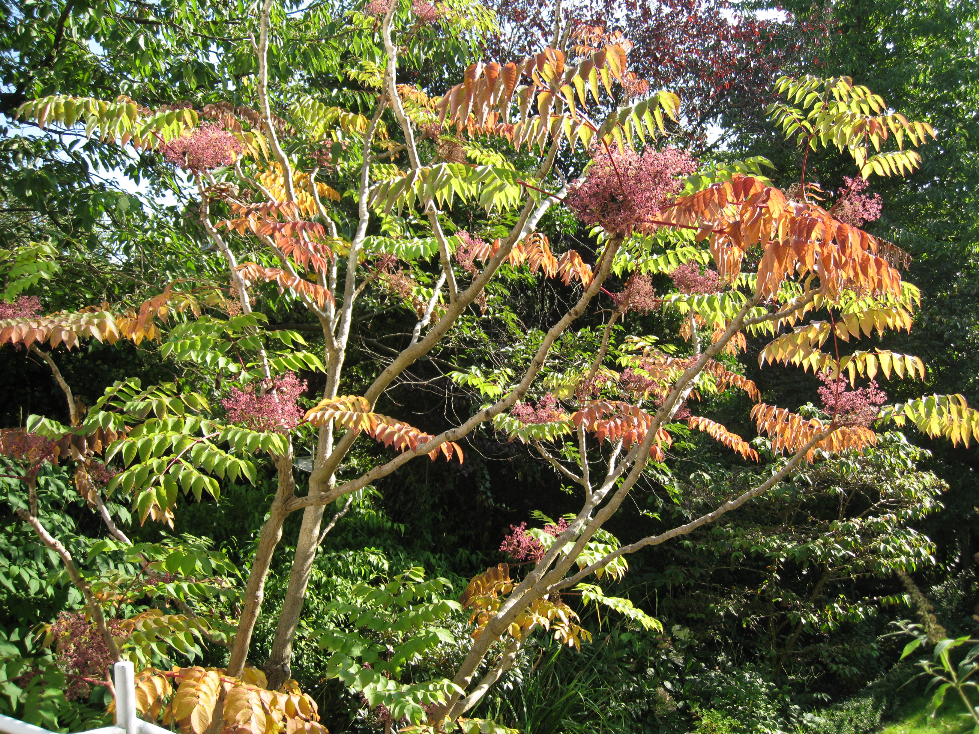 Japanische Aralie (Aralia elata), auch Japanischer Angelikabaum oder Teufelskrückstock genannt.